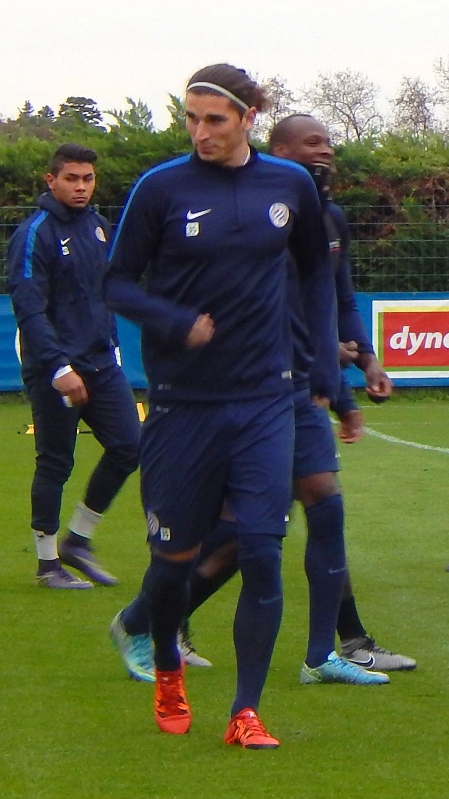 Dylan Gissi (Montpellier), décembre 2015.